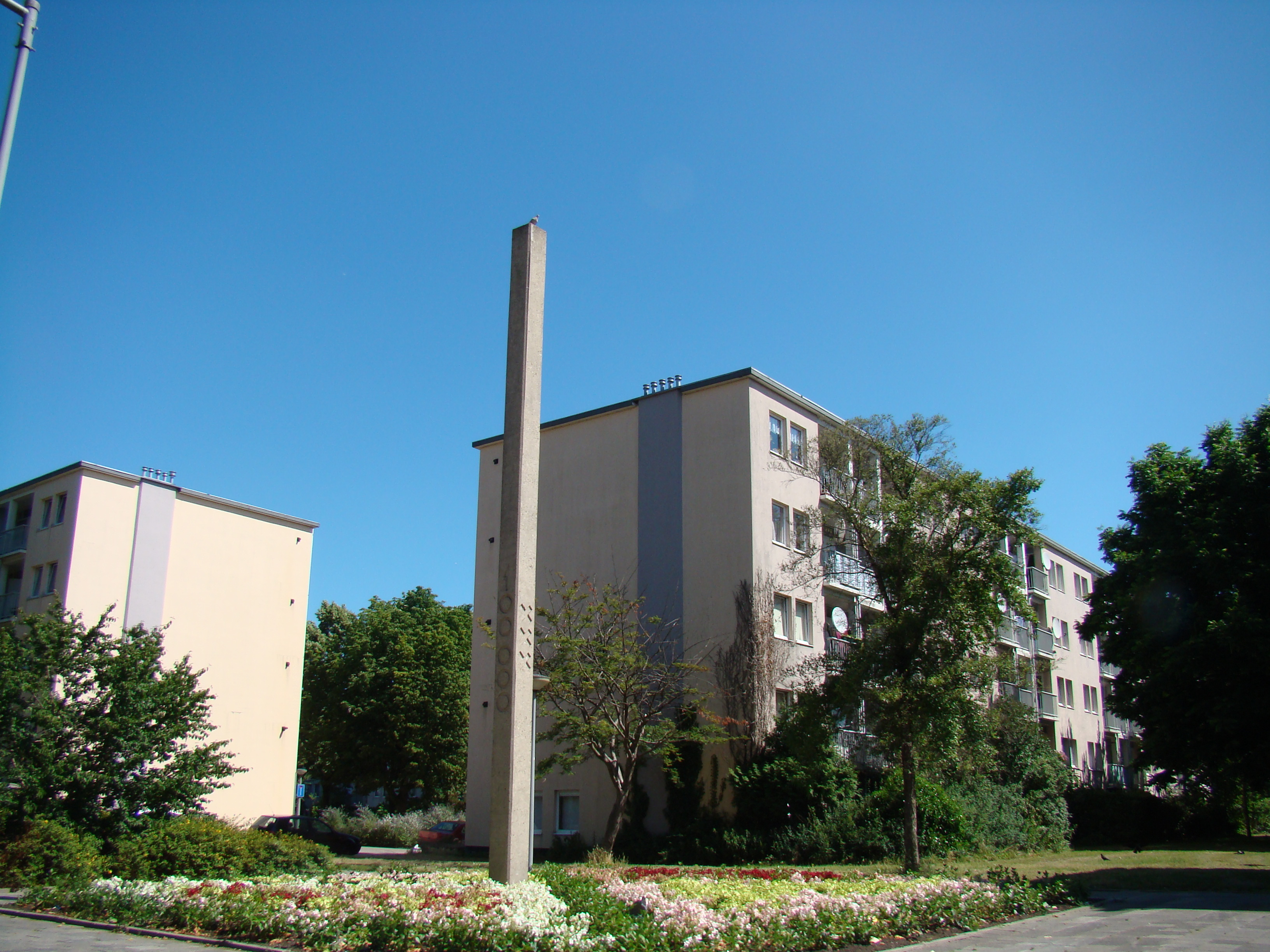 Impression of Osdorp (Netherlands) - Saaftingestraat Heipaal 100.000 in Amsterdam/The Netherlands